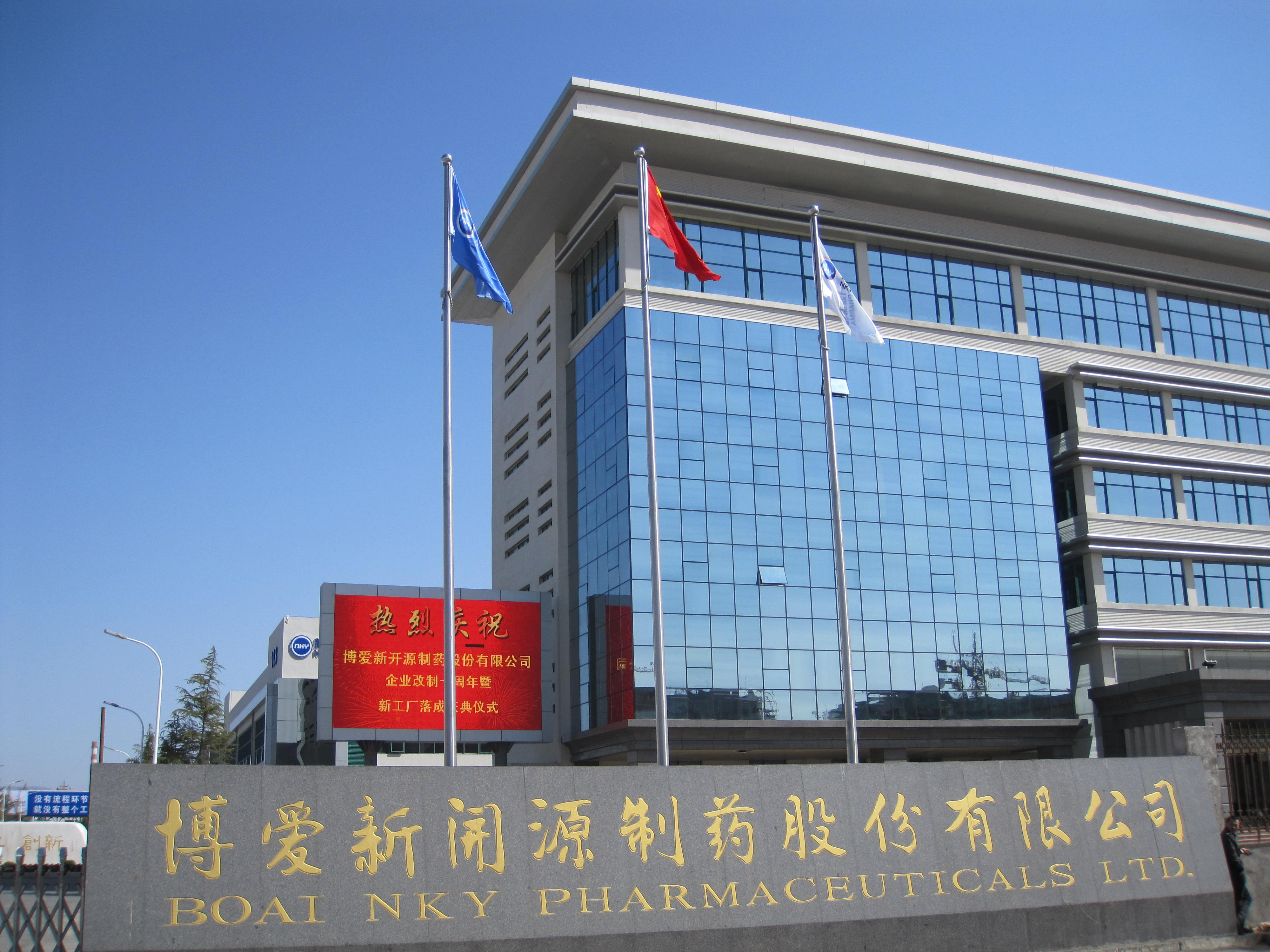 ビル